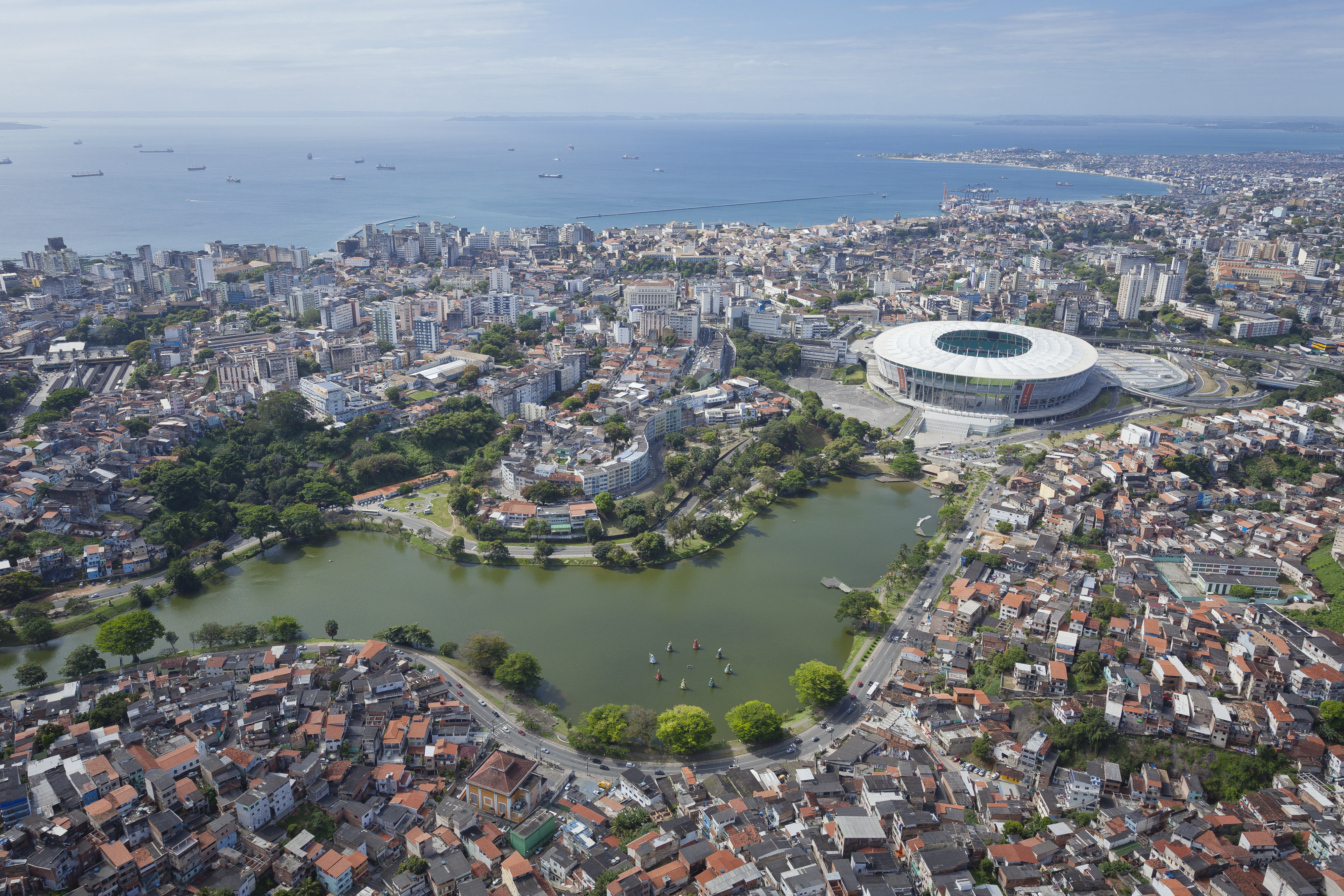 Arena Fonte Nova, Stadion für die WM 2014